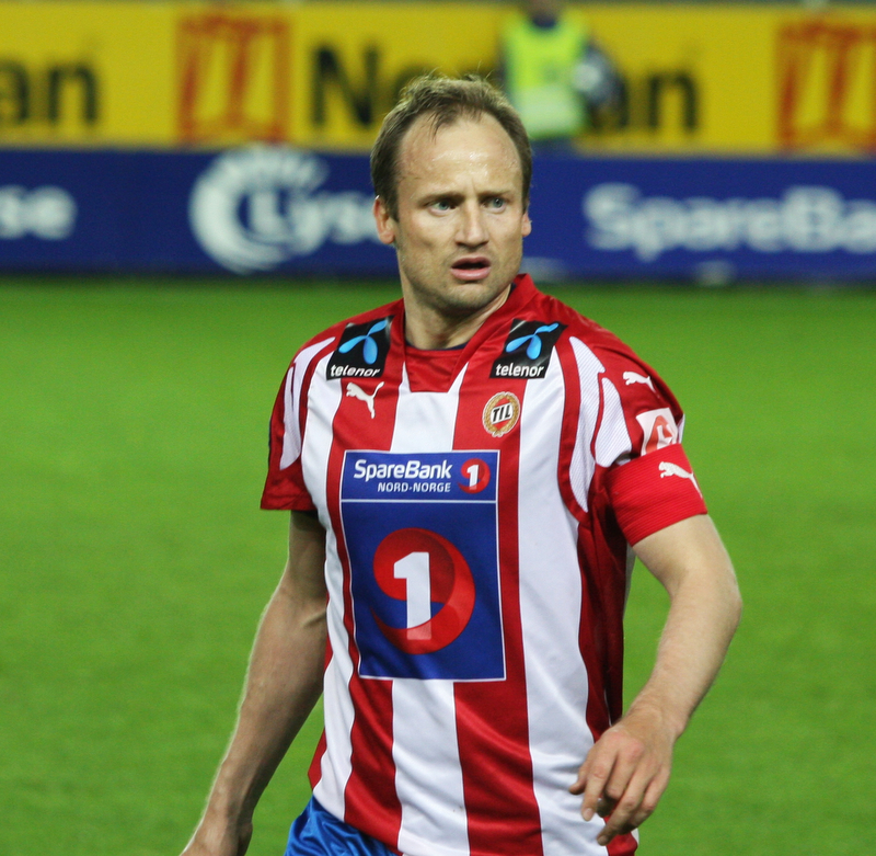 Sigurd Rushfeldt, player for Tromsø IL